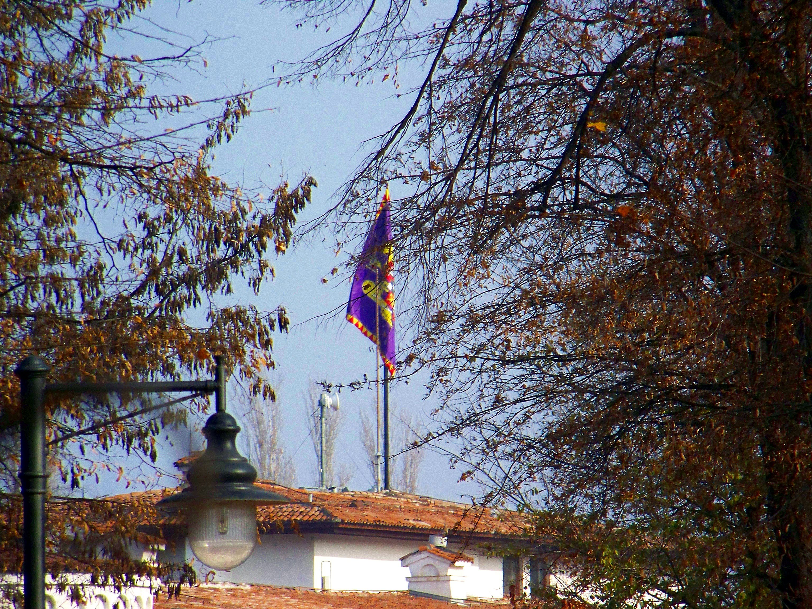 Pavilionul Principesei Mostenitoare la Palatul Elisabeta, Noiembrie 2011